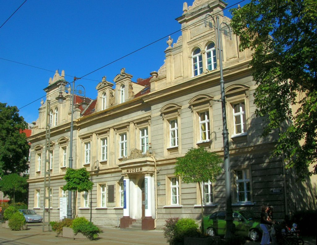 Budynek Muzeum Okręgowego, ul. Gdańska 4 w Bydgoszczy. Obecnie pełni funkcje administracyjne.